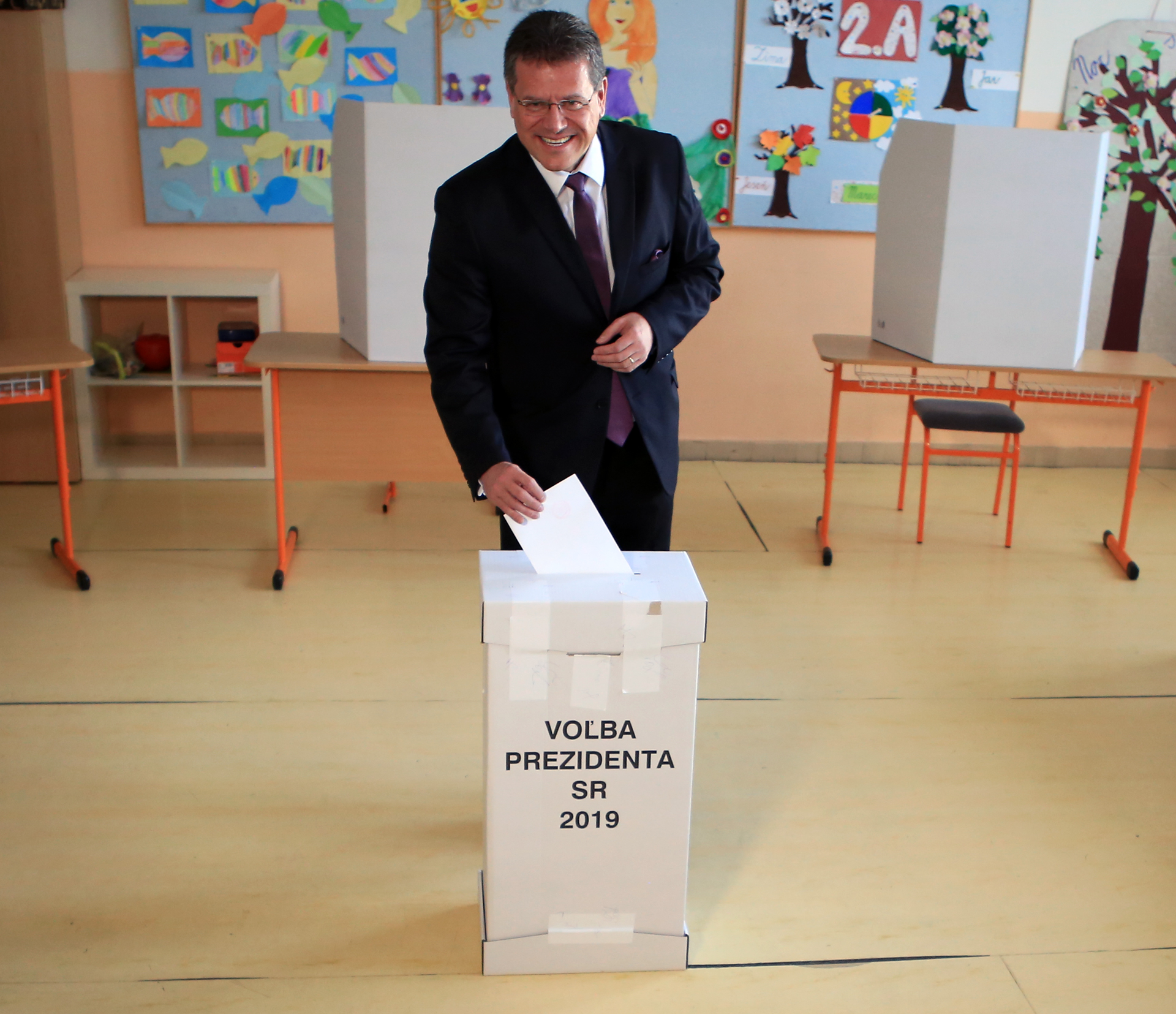 Prezidentský kandidát Maroš Šefčovič vhadzuje obálku so svojou voľbou pri prezidentských voľbách 2019 v priestoroch základnej školy Alexandra Dubčeka.